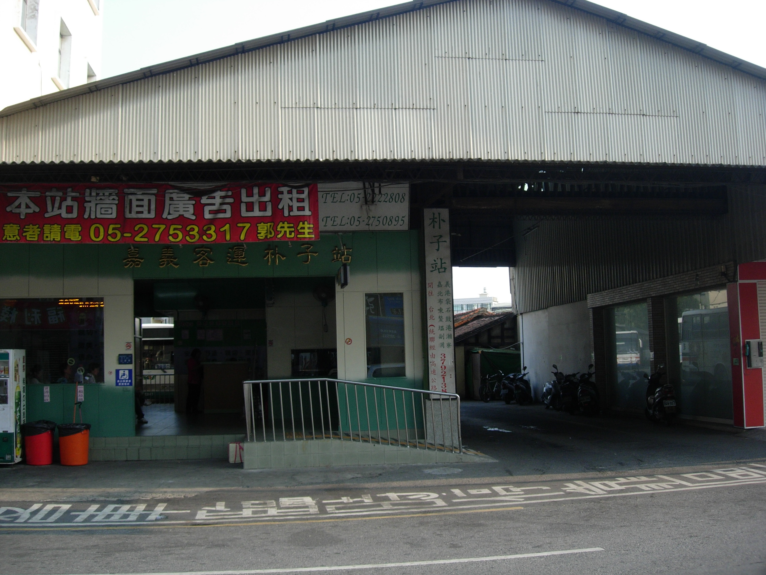 中文（台灣）: 嘉義客運朴子站